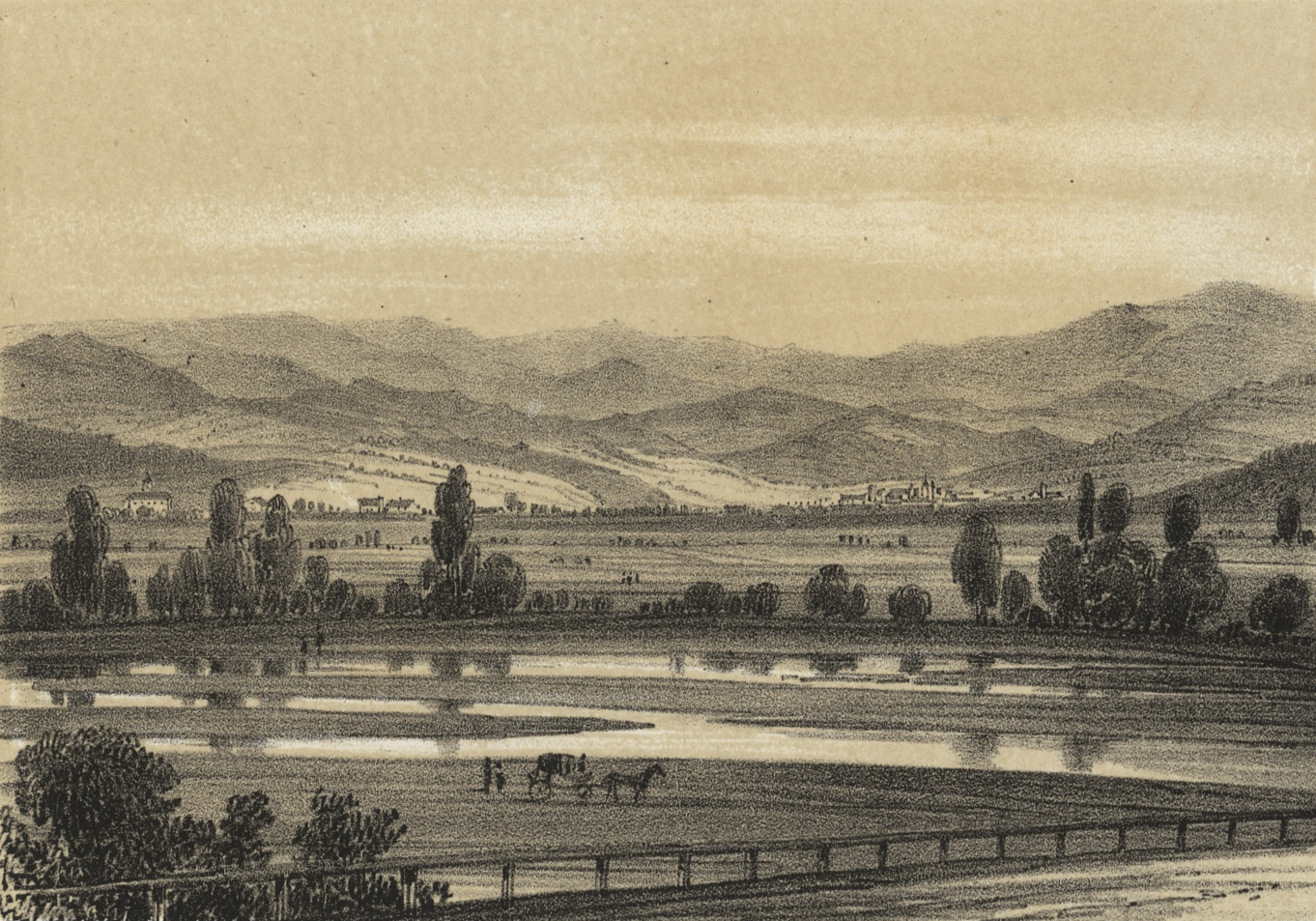 Fernsicht gegen Schönberg, vom Stationsplatze Hohenstadt